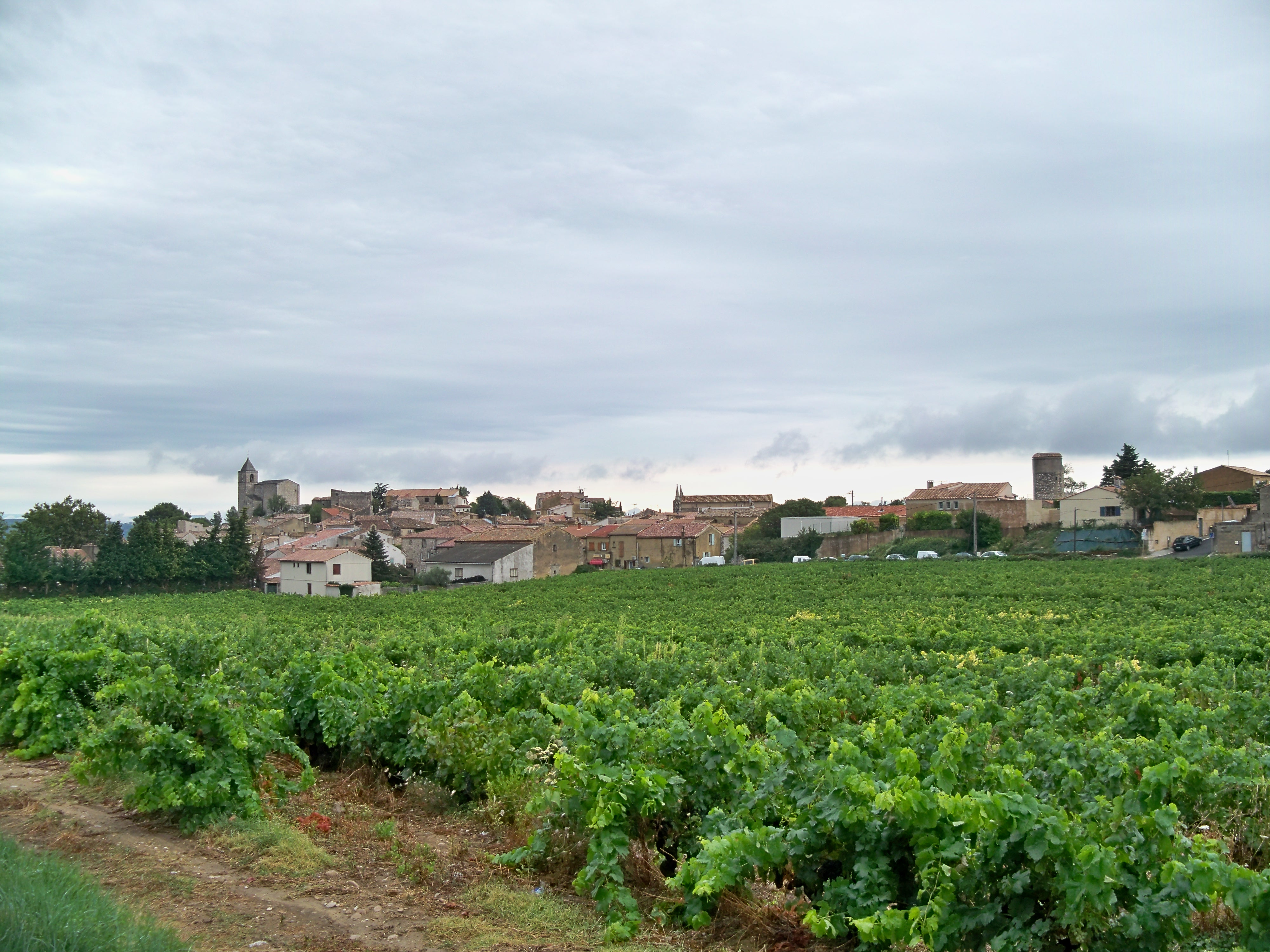 Vigne près de Rochefort du Gard